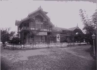 พระที่นั่งอุทยานภูมิเสถียรองค์แรก